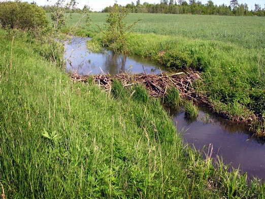 Bebrų užtvenktas upelis